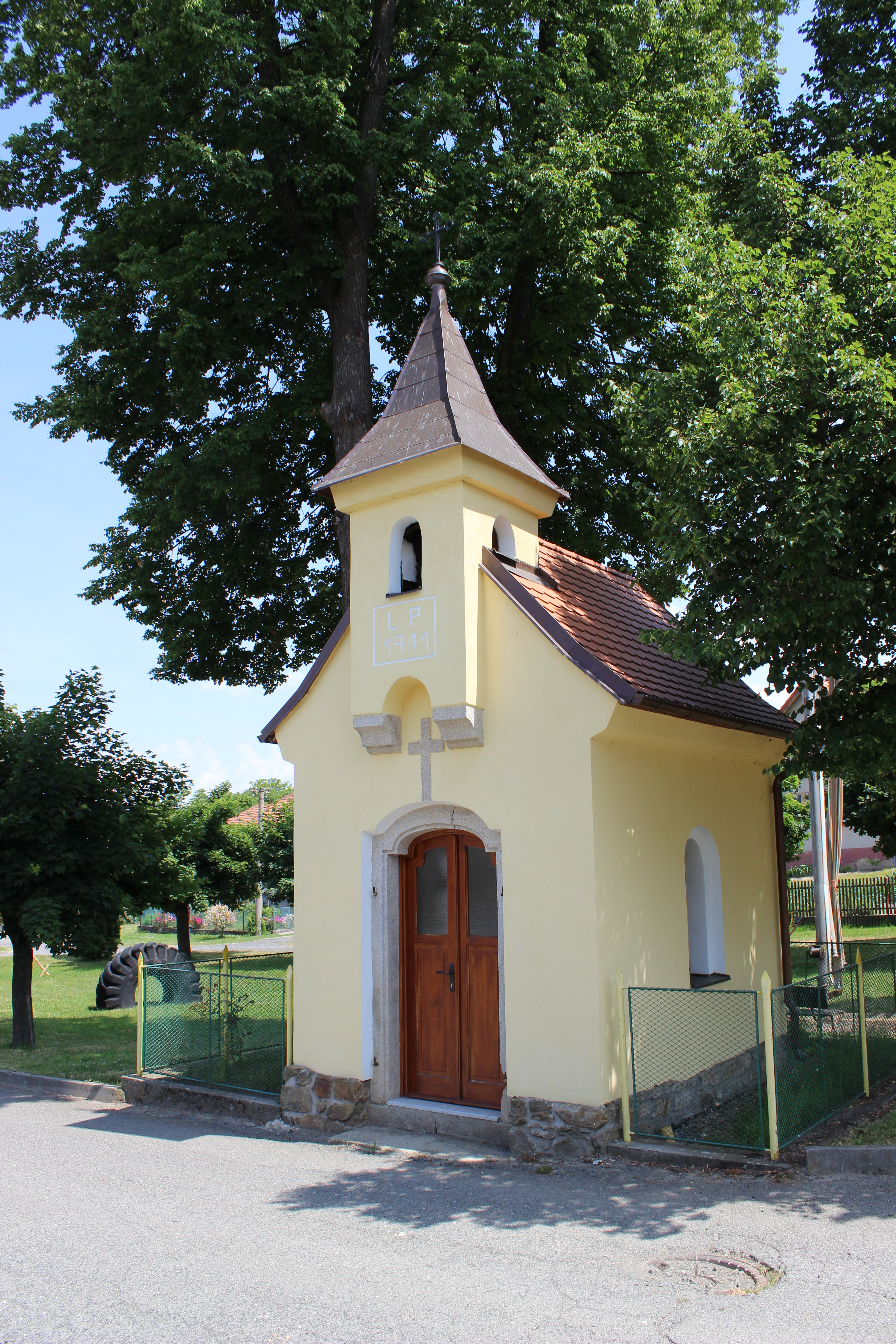 Kaplička na návsi v Lokti v okrese Benešov (pohled od jihozápadu).